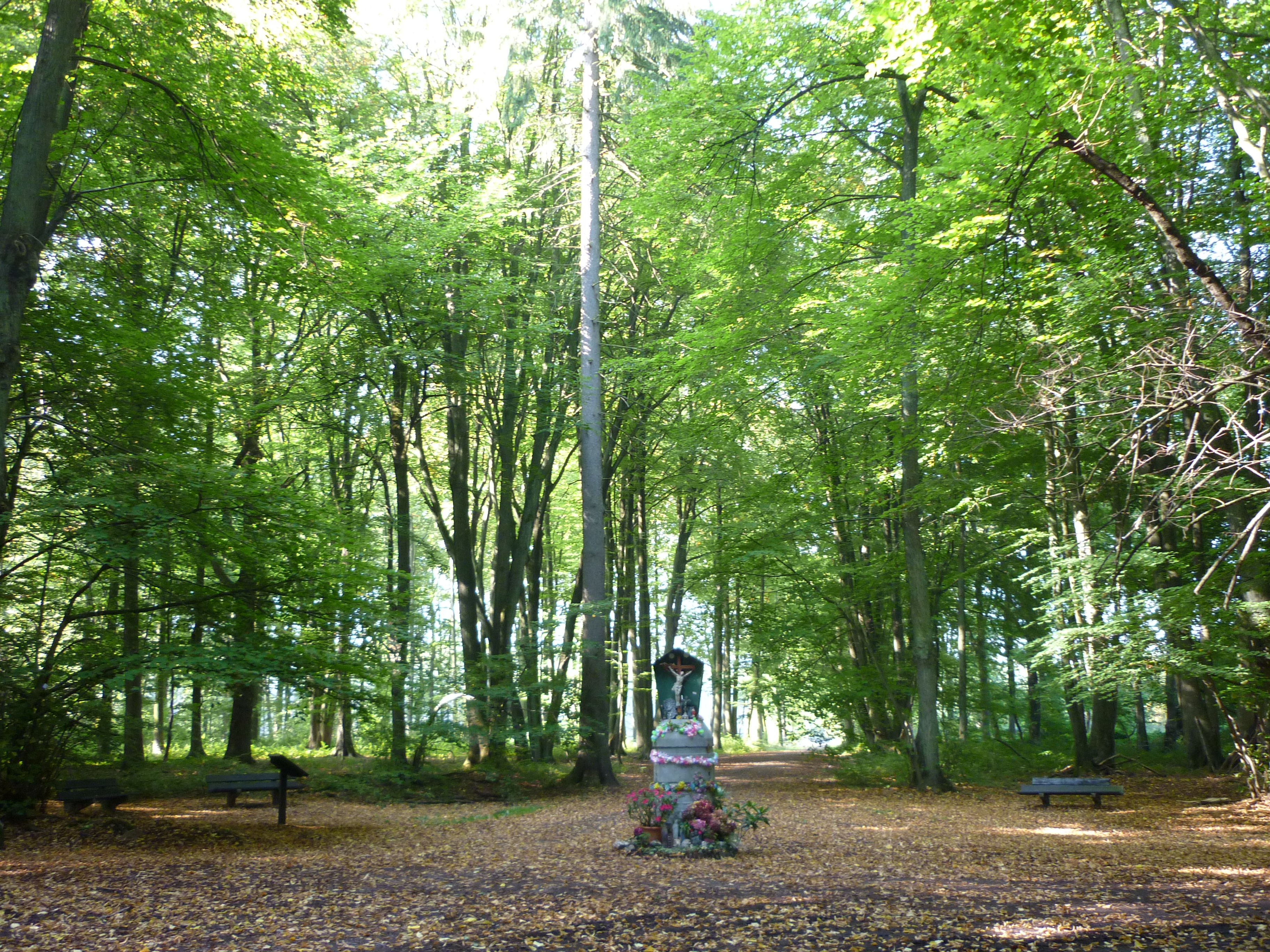 Li Bê Bon Dju - Bois de la Vêcquée (Seraing)